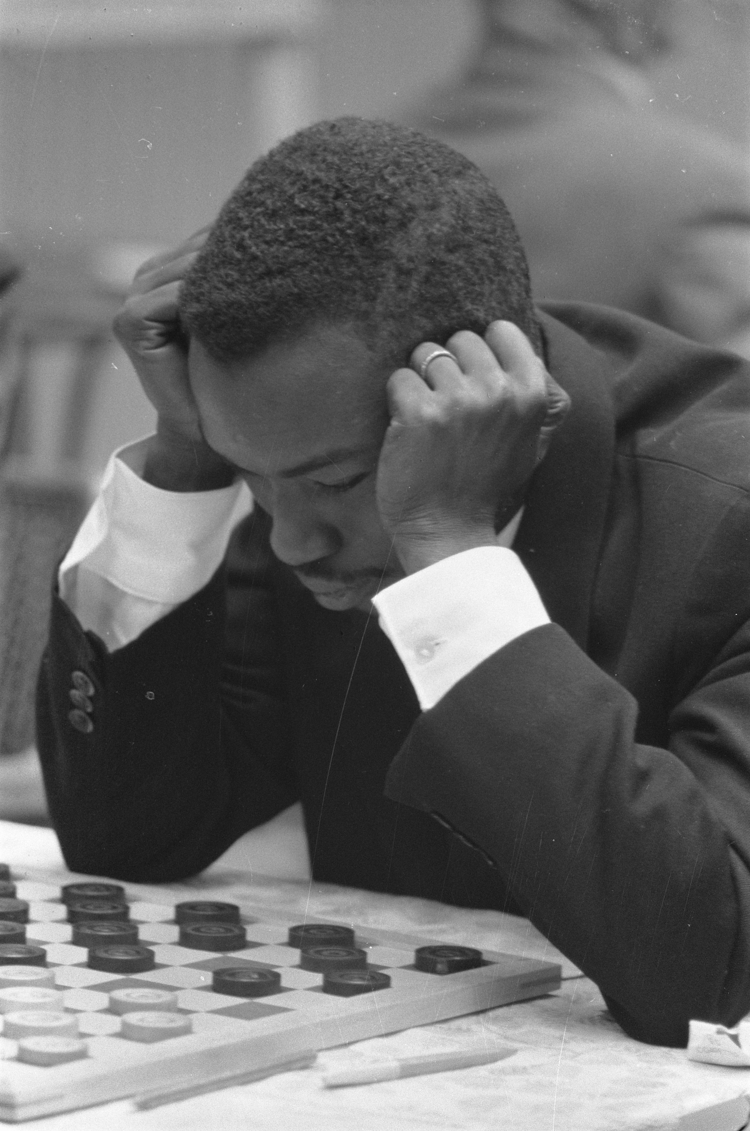 Wereldkampioenschap dammen te Amsterdam, Baby Sy